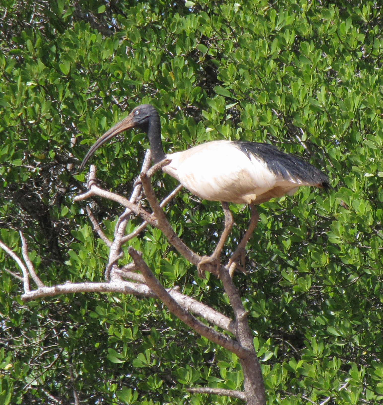 Threskiornis bernieri au complexe Mahavavy Kinkony, Madagascar